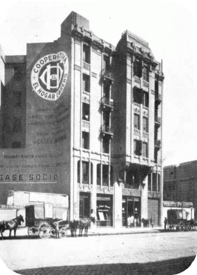 Primera foto del Edificio Juan B. Justo, construido y administrado por la cooperativa socialista de vivienda "El Hogar Obrero" en 1913. Avenida Martín García, esquina Bolívar, Buenos Aires. Luego fue ampliado y modificado.